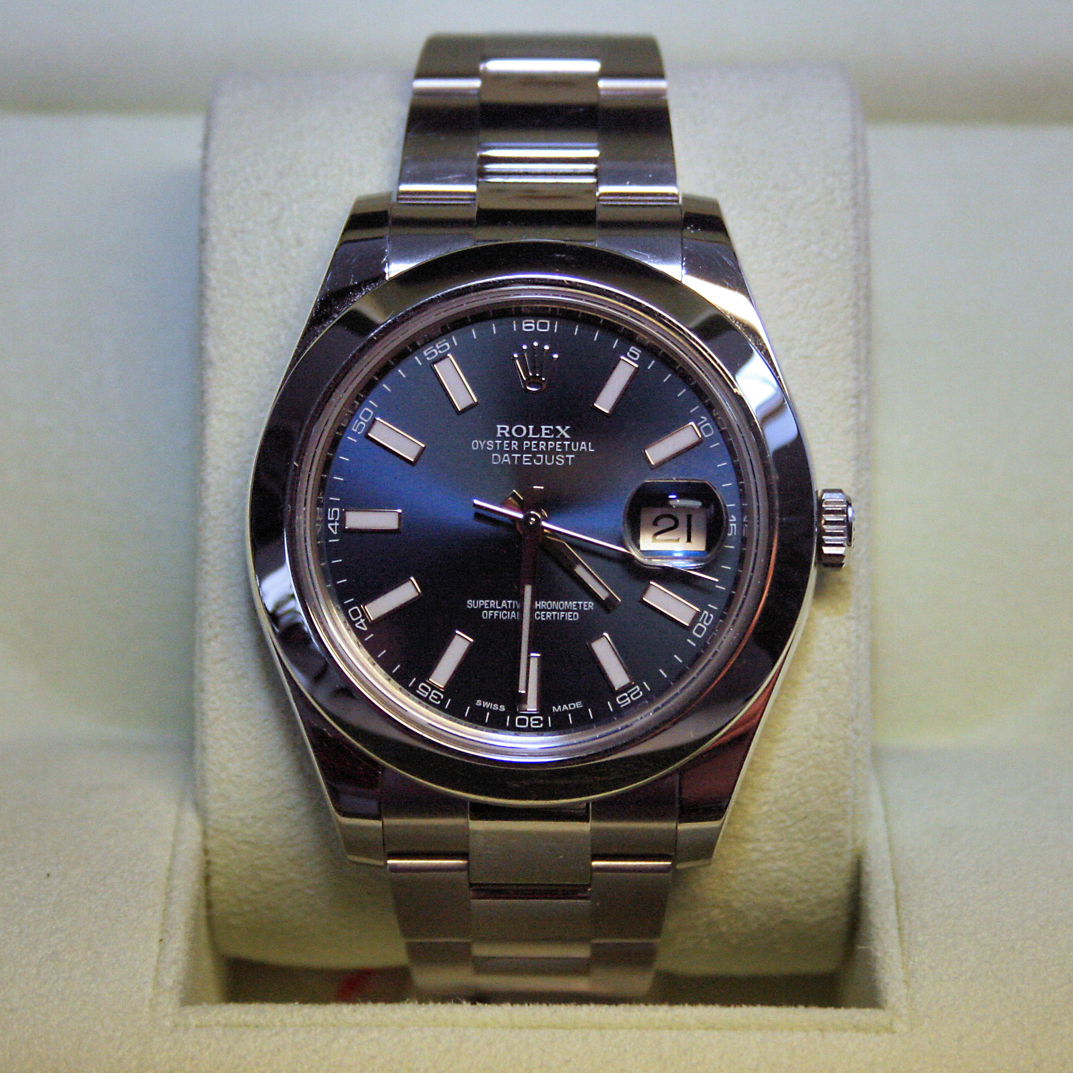 Datejust II in der Schatulle